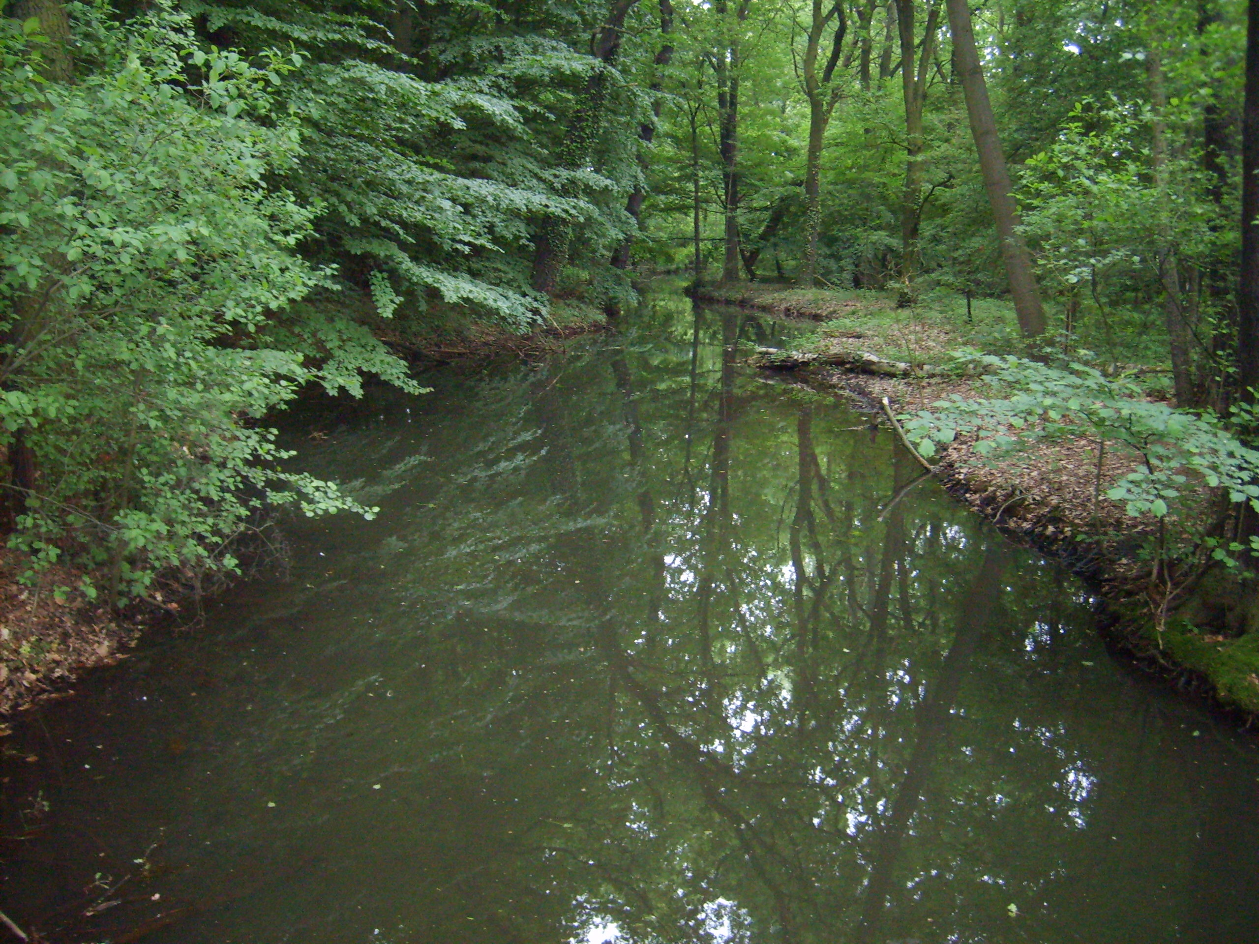 Auwaldrest am einstigen Flußlauf der Schwarzen Elster bei Saathain.